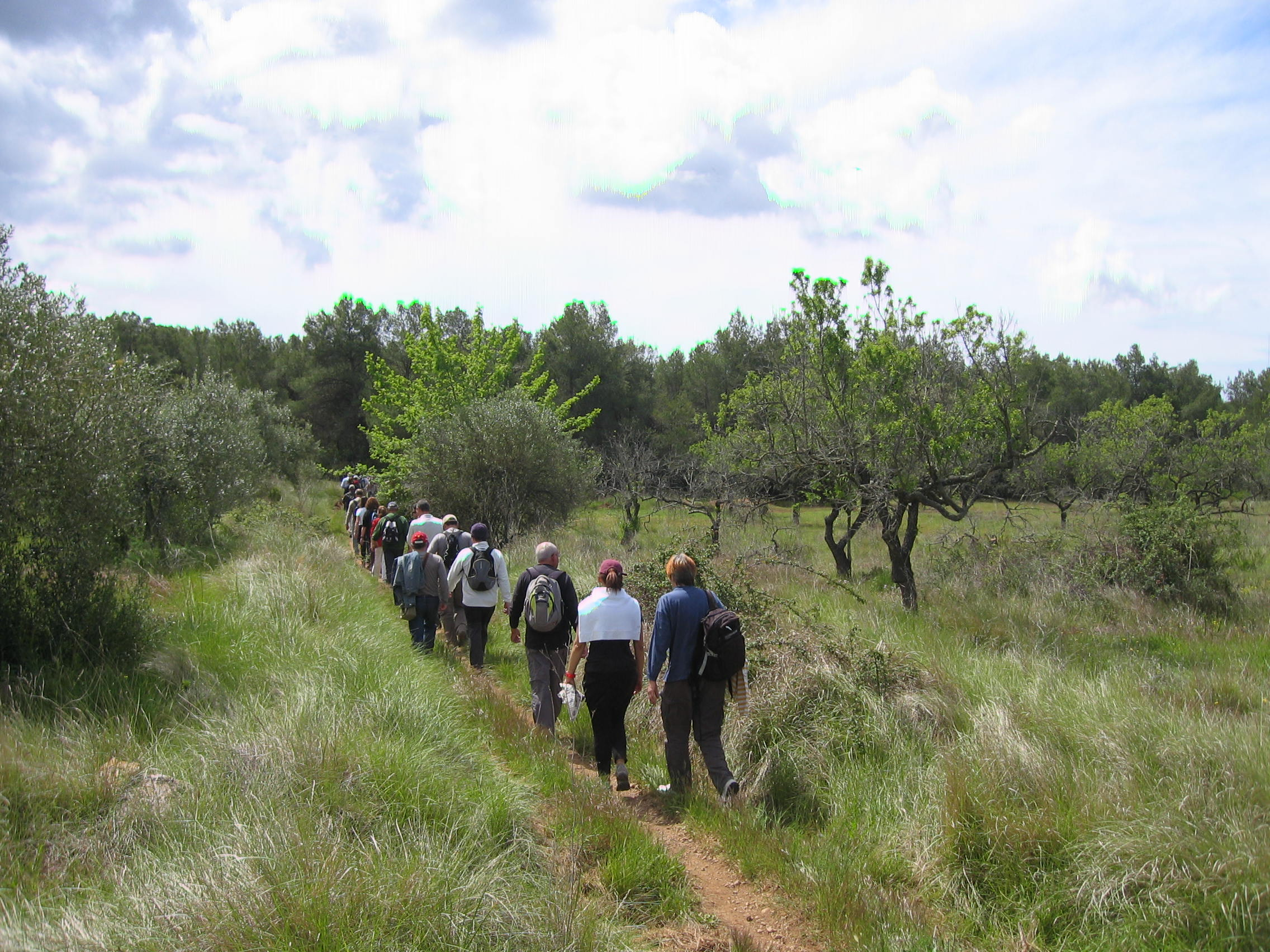 Grup d'excursionistes seguint la ruta Bonastresc al seu pas per els Plans (Bonastre)